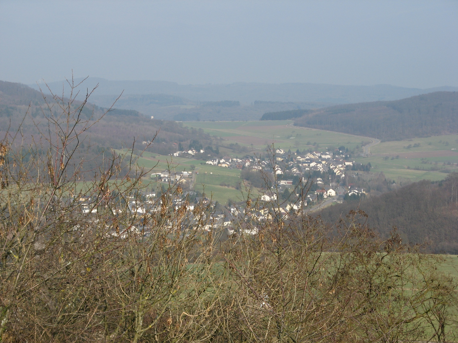 Ortsansicht von Barig-Selbenhausen